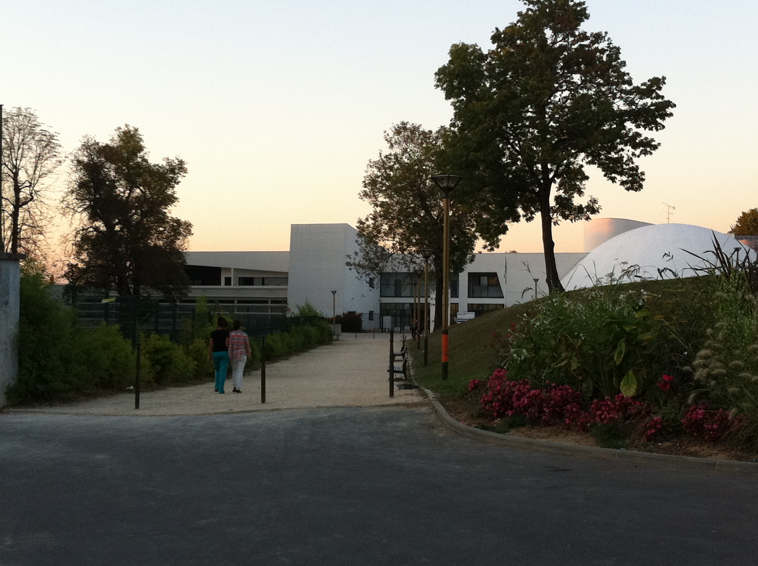 Prise le 03 octobre 2011.